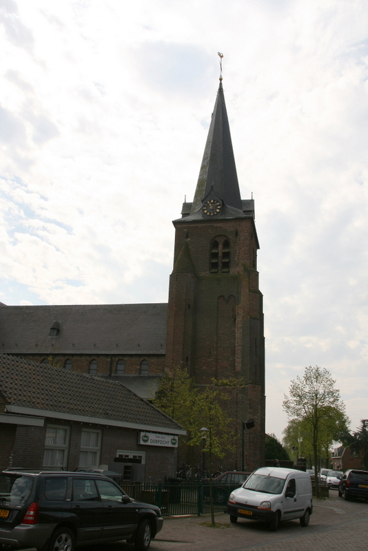 Lage Mierde - Dorpsplein 1 - St. Stephanuskerk